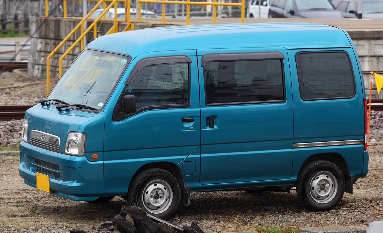 Subaru Sambar van ('05 11 - '09 09)